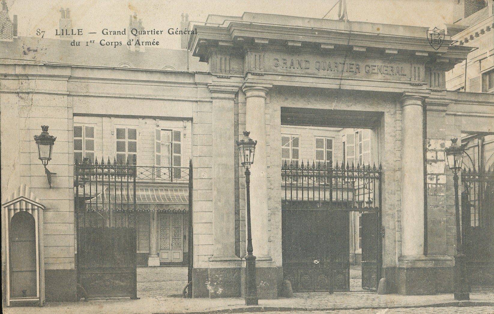 Lille - 87 - Grand Quartier Général du 1er Corps d'Armée, 14 rue Négrier. De cet ensemble ne subsiste que le corps principal et l'aile gauche, aux façades sans relief. Voir le site : La page Wikipédia 1er corps d'armée renvoie à cette photo.